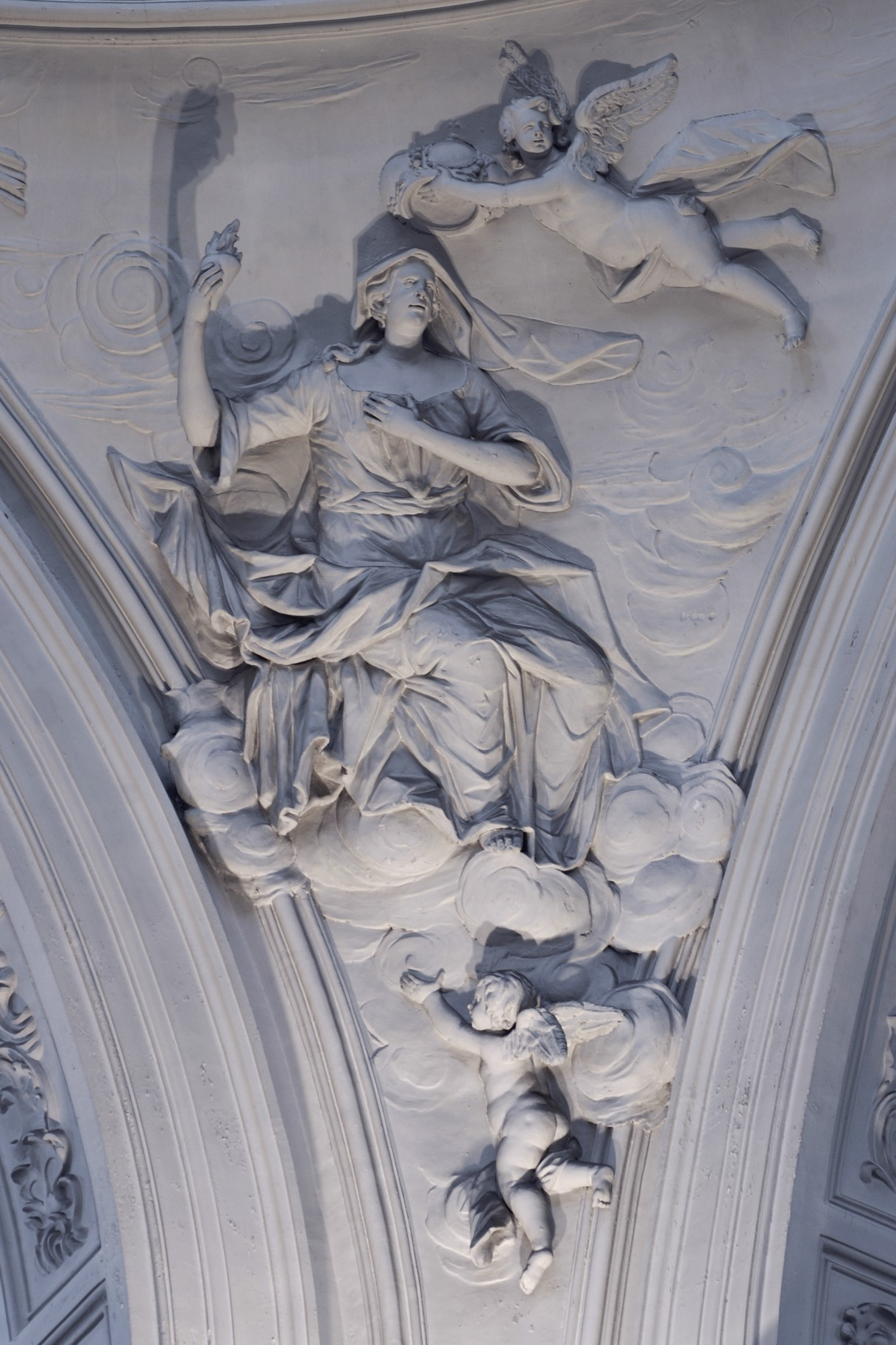 Cathédrale de St-Aubain (Namur) - Allégorie de la charité